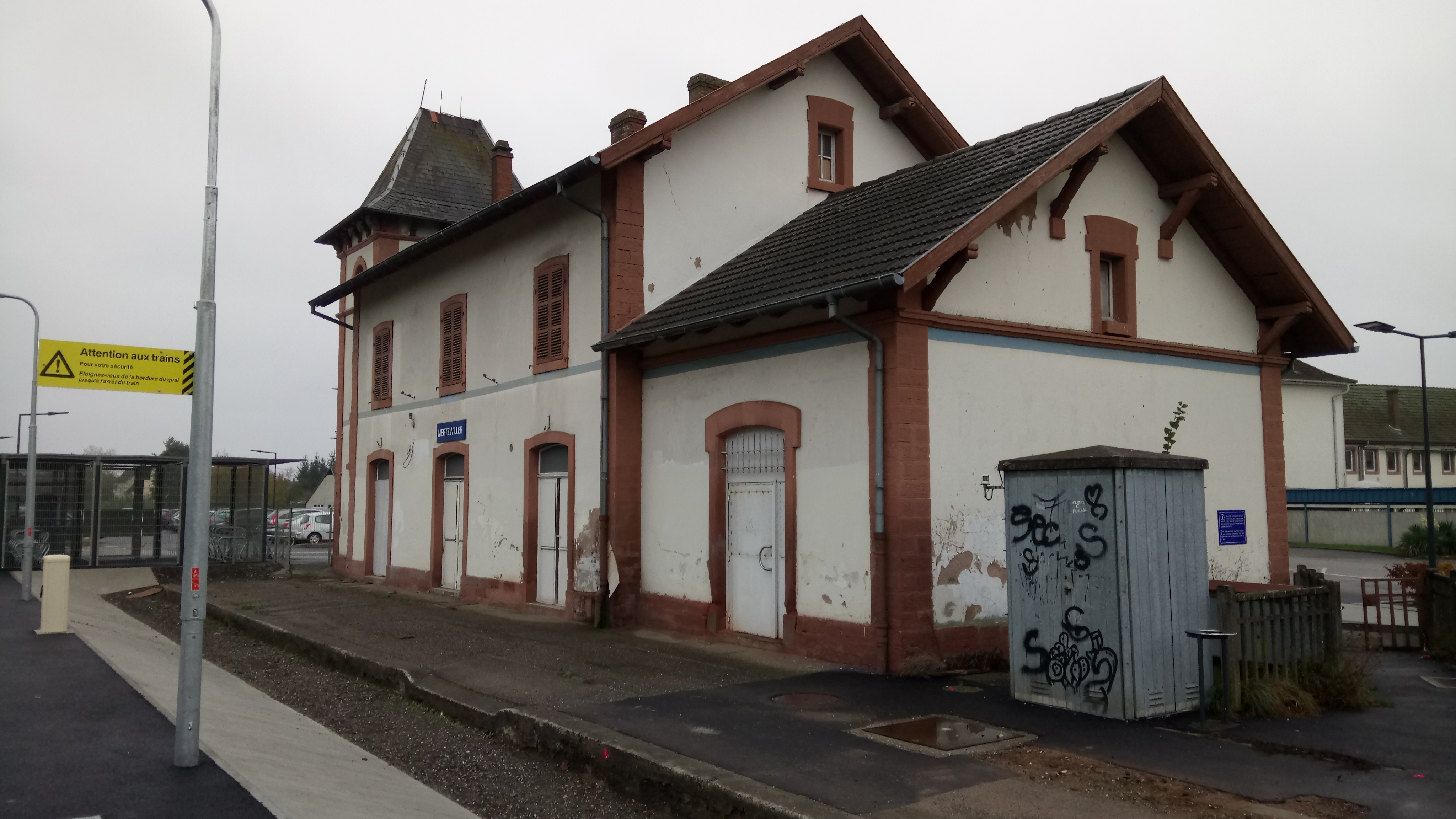 Bâtiment voyageurs de la gare de Mertwiller, côté voie.